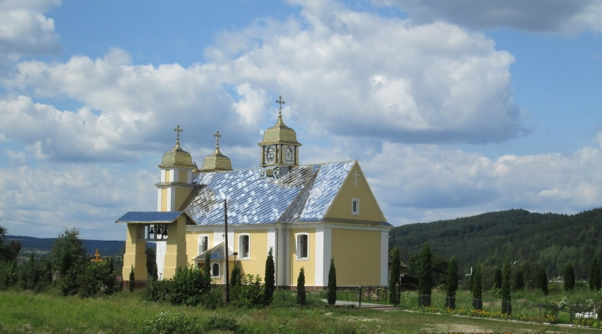 Eglise abbatiale du chapitre Saint-Michel de Sozan